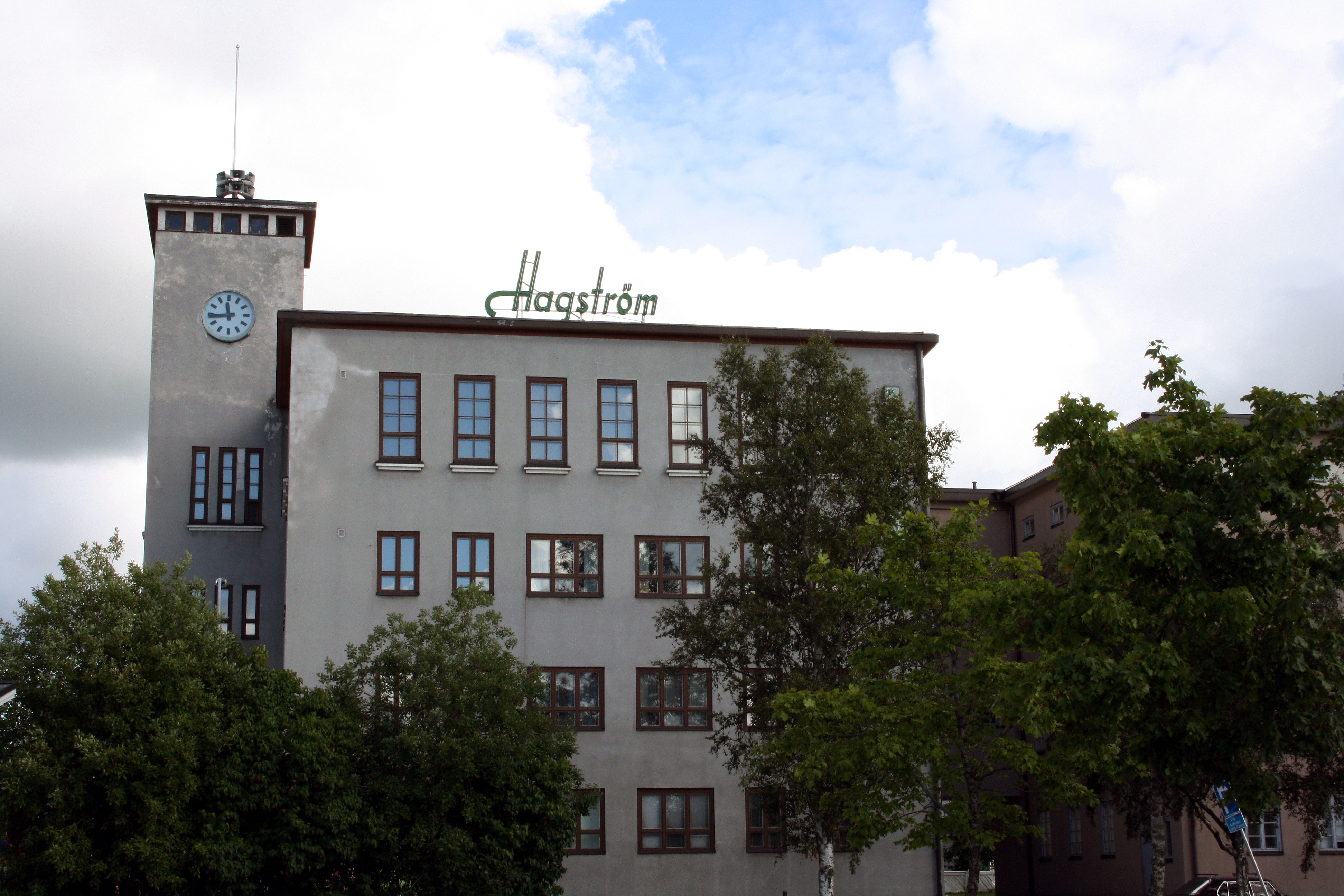 Hagströmin nahkatehdas Kokkolassa, Suomessa.